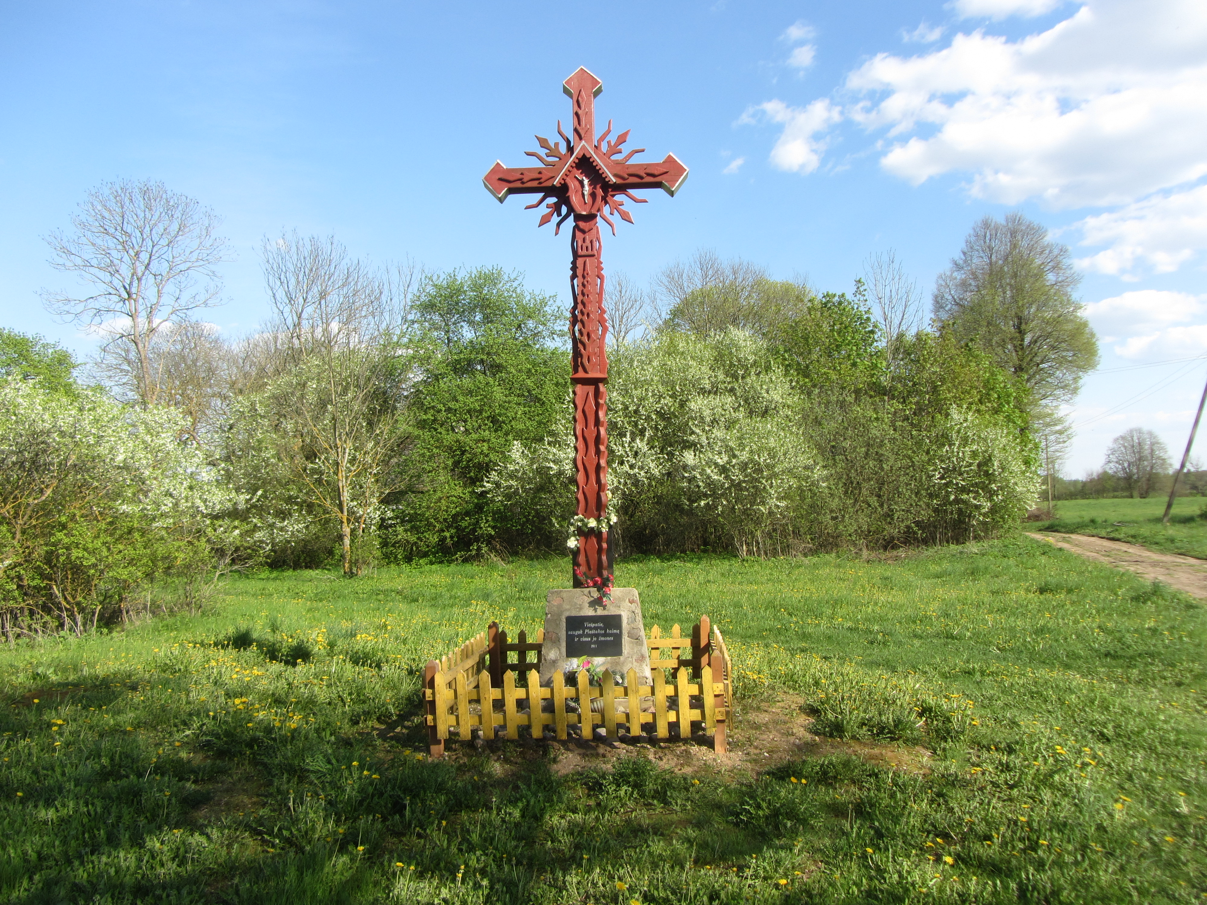 Kurklių sen., Lithuania